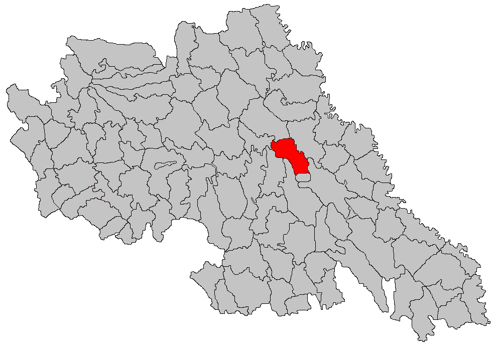 Categorie:Hărţi ale judeţului Iaşi